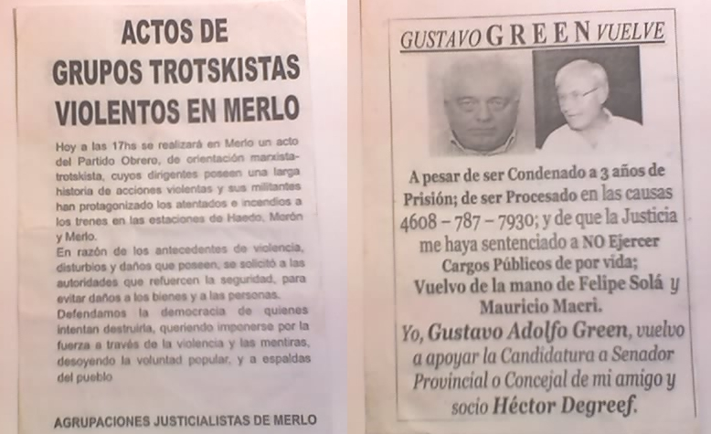 Panfletos repartidos en las elecciones de 2009 en la localidad de Merlo.